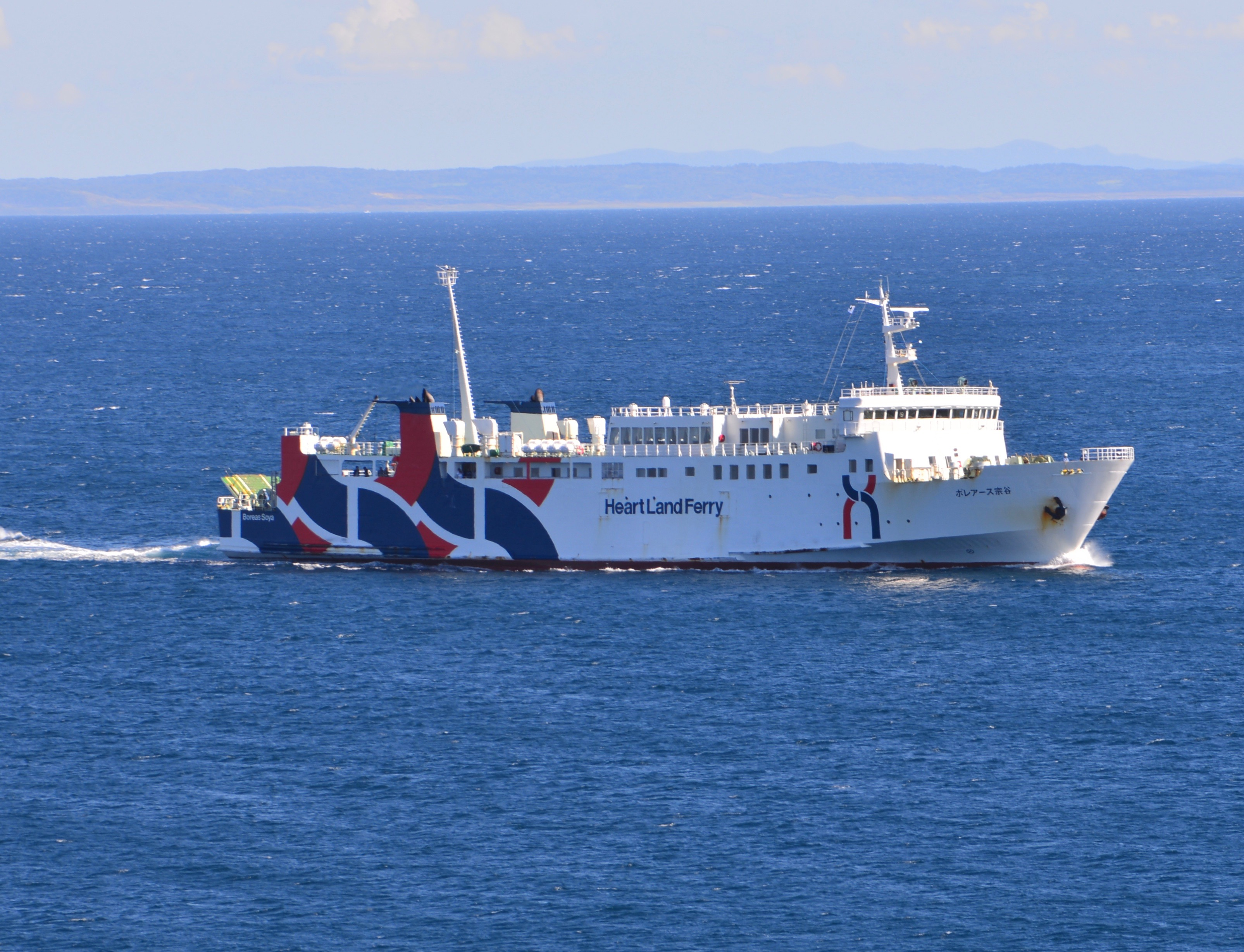 利尻島鴛泊港に入港するボレアース宗谷。ペシ岬にて撮影